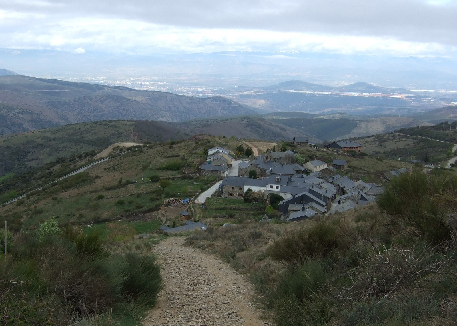 El Acebo und im Hintergrund Ponferrada im April 2009